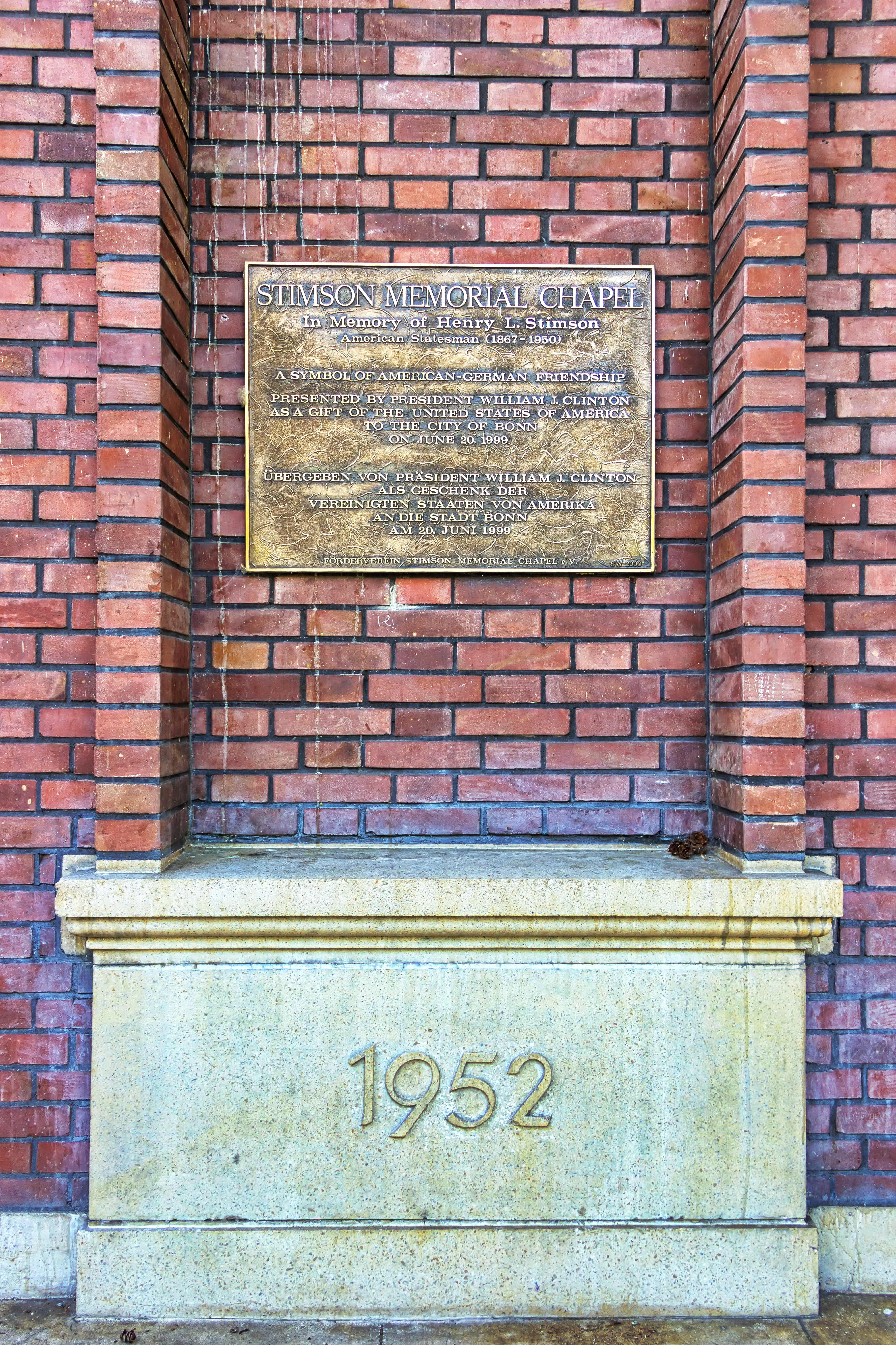 Stimson Memorial Chapel, Kennedyallee 150, Bonn-Plittersdorf: Gedenktafel des Fördervereins Stimson Memorial Chapel e.V., gestaltet von Sigrid Wenzel 2000